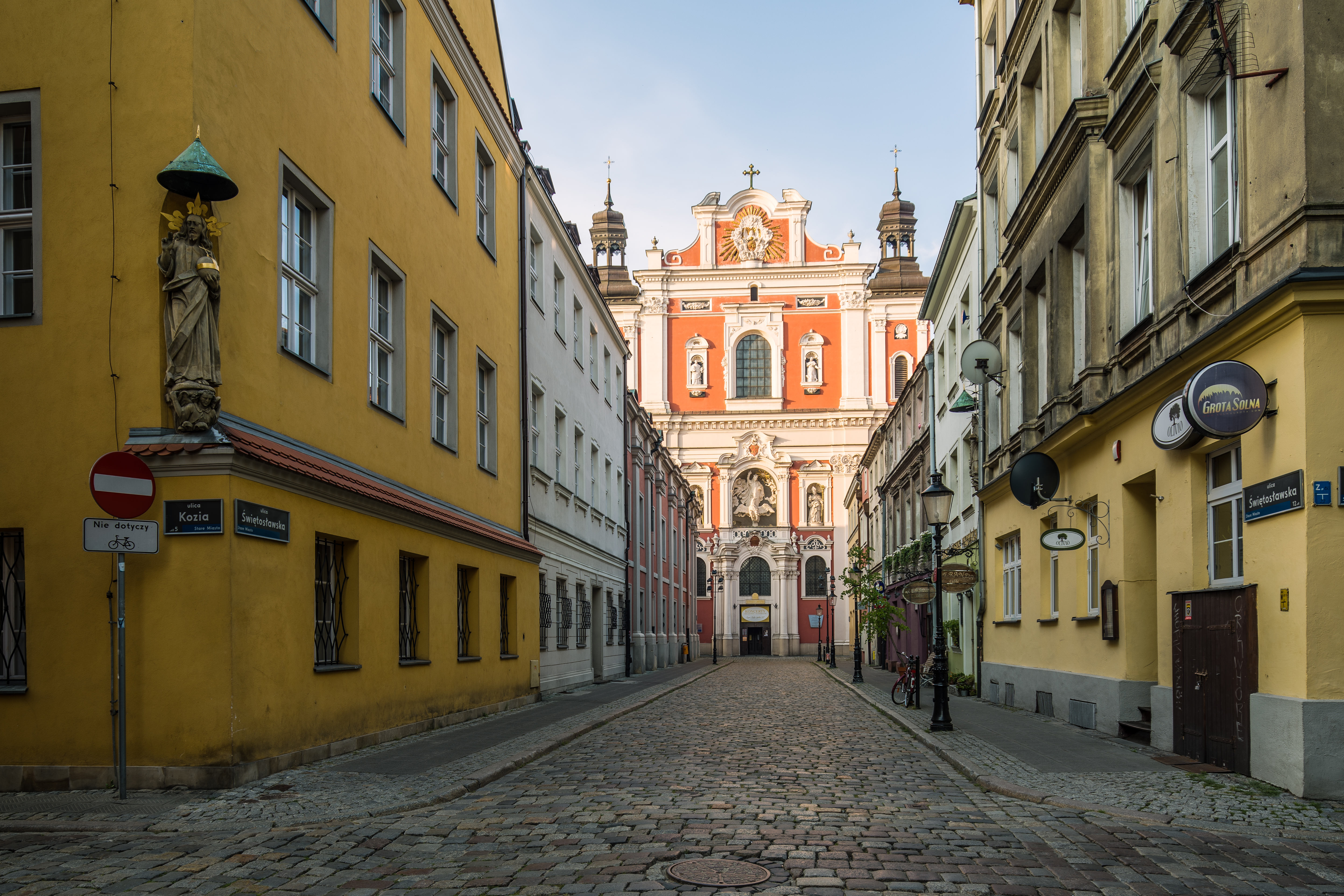 Poznań, kościół, ob. par. p.w. św. Marii Magdaleny i św. Stanisława, 1651-1701, 1 poł. XVIII